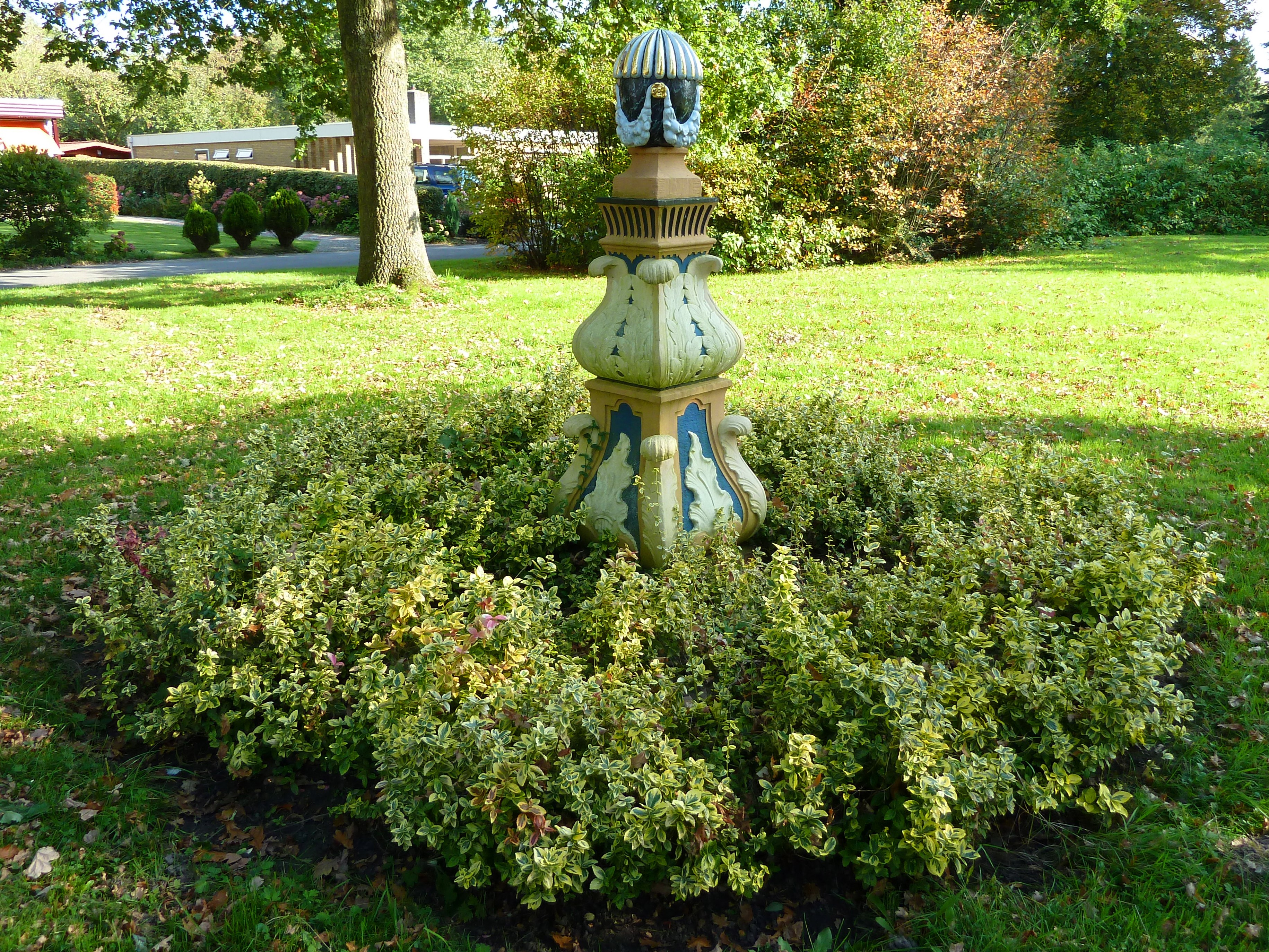 Het waarschijnlijk tot de vroegere Hanckemaborg behorende zandstenen ornament nabij de Hanckemalaan in Zuidhorn.